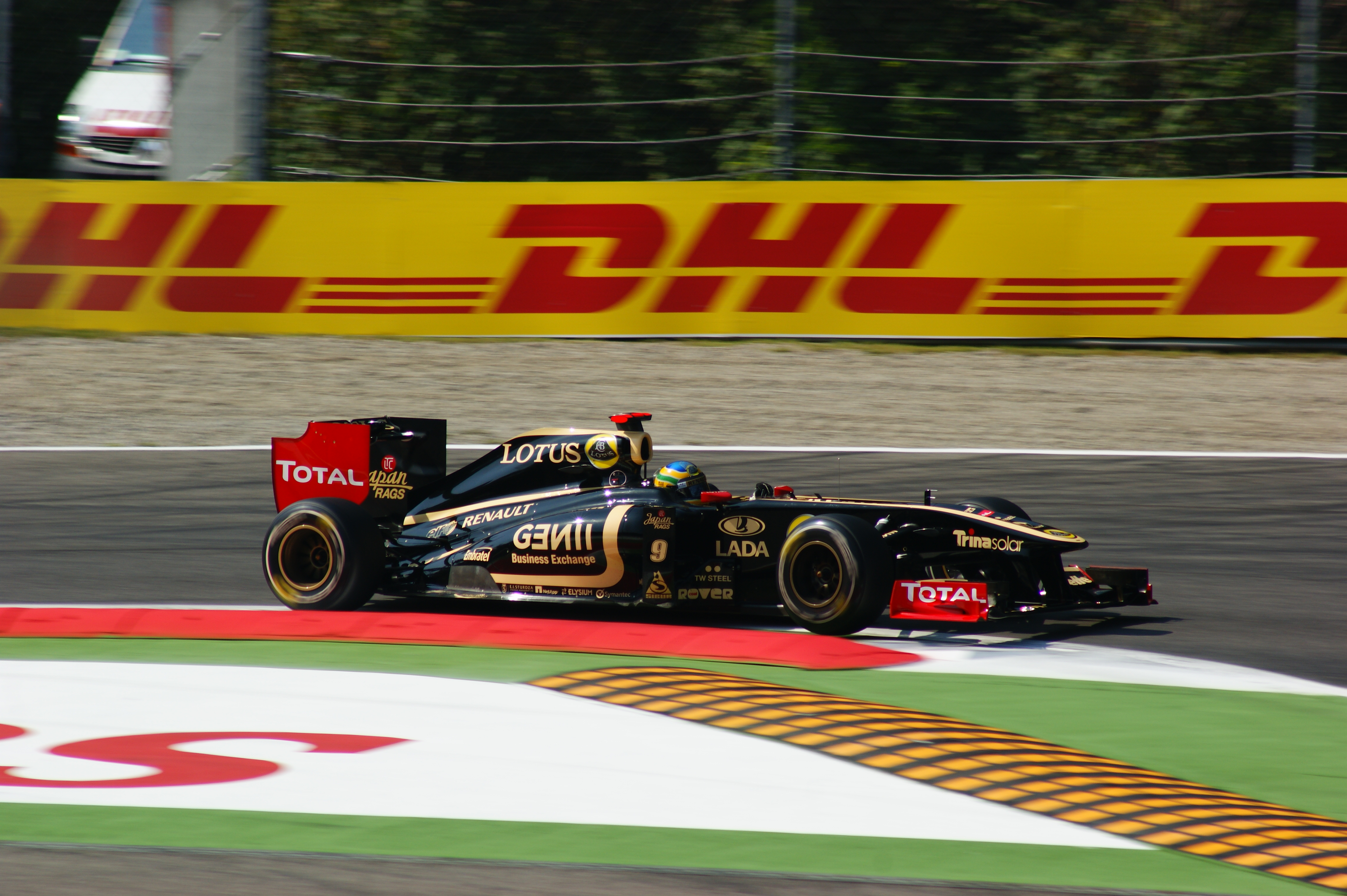 Bruno Senna alla variante della roggia Monza 2011